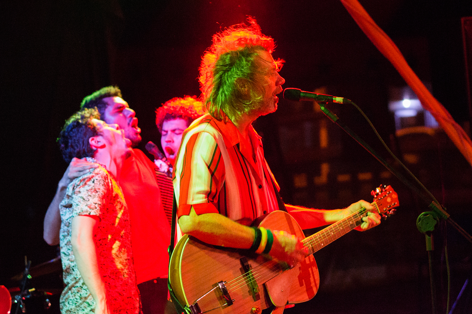 Wander Wildner c/ Helio Flanders (Vanguart), Bruno Kayapy (Macaco Bong) e Dennis Rodrigues (Imitáveis) @ Festival Bananêra Elétrica. Cuiabá, Mato Grosso, Brasil. 16 de Novembro de 2014.